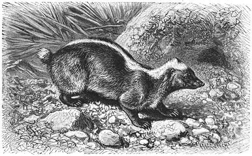 Stinkdas (Mydaus meliceps) Currently Mydaus javanensis